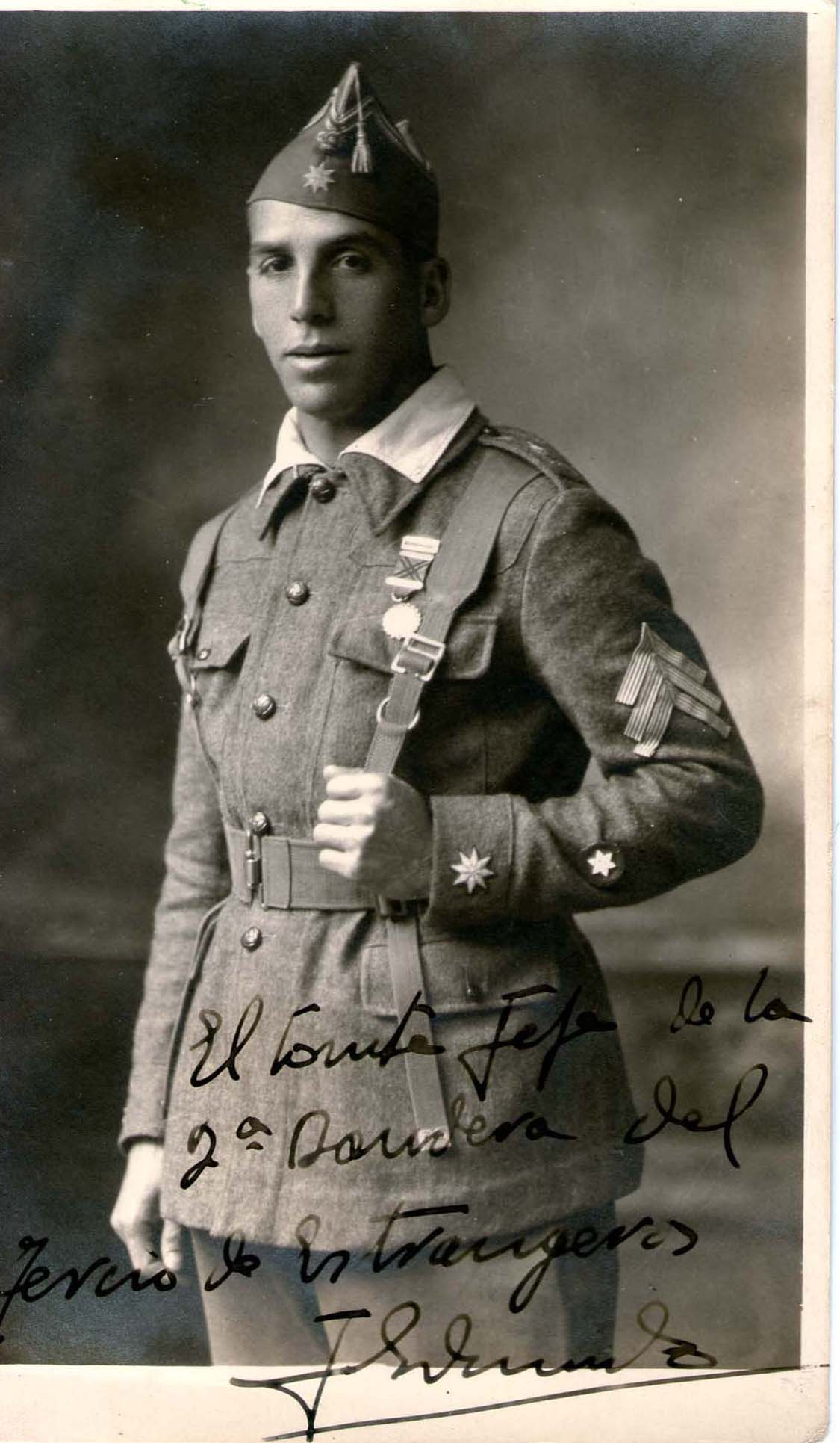 J.E Villalba